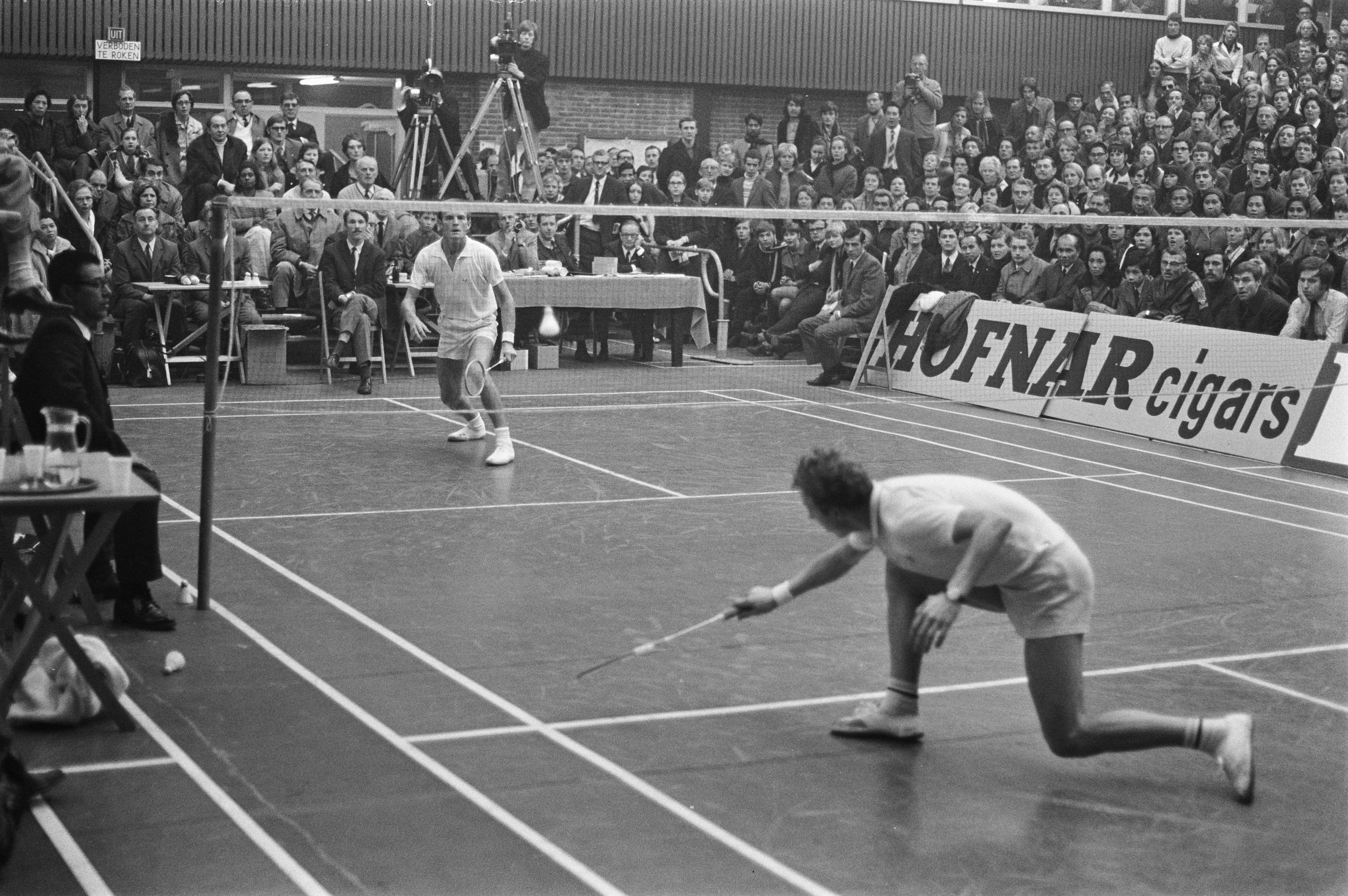 Collectie / Archief : Fotocollectie Anefo Reportage / Serie : [ onbekend ] Beschrijving : Internationale badmintonwedstrijden in Duinwijckhal Haarlem Spelmoment Datum : 15 februari 1970 Locatie : Haarlem Trefwoorden : badminton Persoonsnaam : Duinwijckhal Fotograaf : Verhoeff, Bert / Anefo Auteursrechthebbende : Nationaal Archief Materiaalsoort : Negatief (zwart/wit) Nummer archiefinventaris : bekijk toegang 2.24.01.05 Bestanddeelnummer : 923-2557 Reacties Geplaatst door Guus van der Vlugt op 07 maart 2016 - 19:32. Alan Parson (Zuid-Afrika) achter het net tegen Elo Hansen (Den) finale Hansen wint